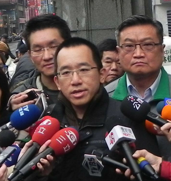 陈水扁儿子陈致中接受媒体采访（美国之音许波拍摄）